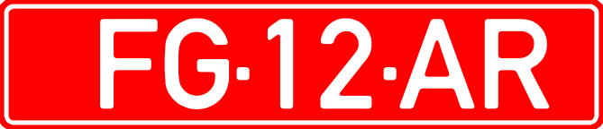 Номерний знак Кабо-Верде